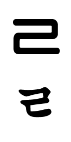 Korean Alphabet ㄹ(ri.eul)